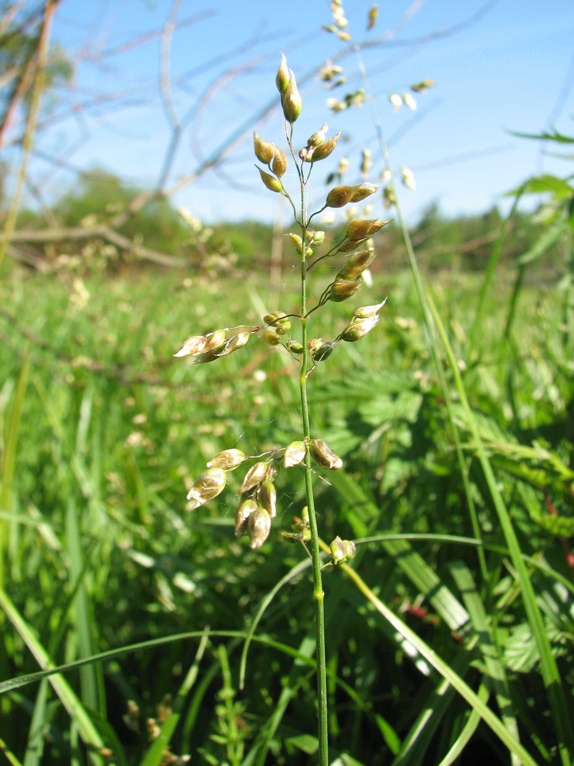 Зубровка душистая (Hierochloe odorata) в Гатчинском парке